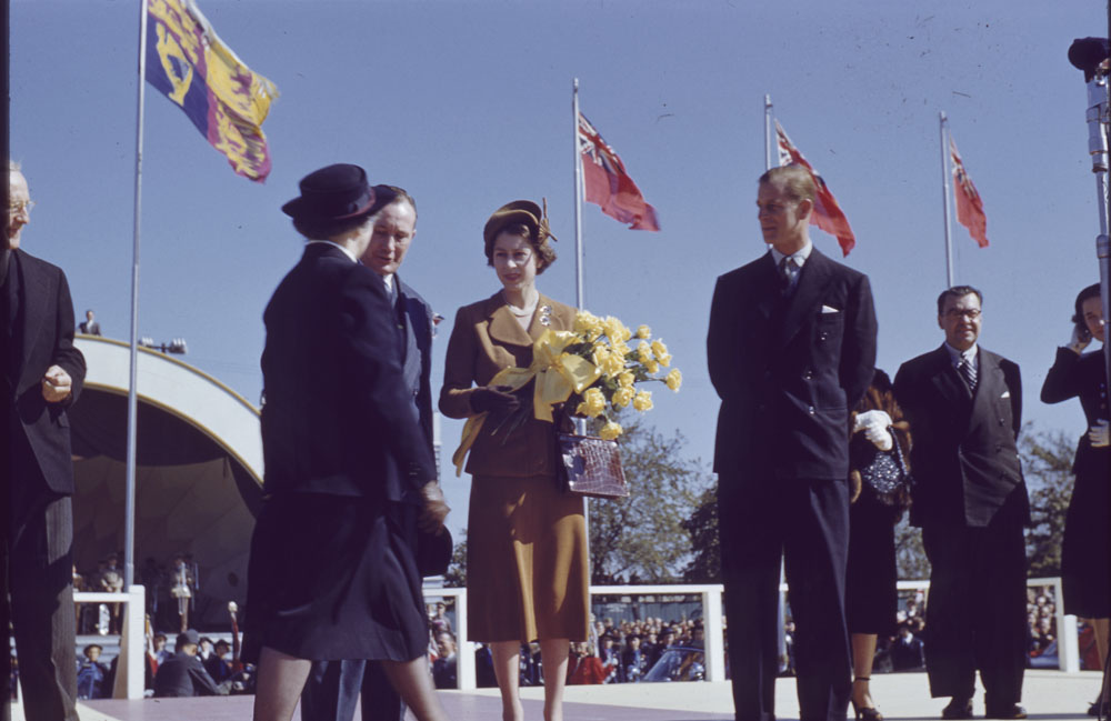 Title / Titre : Princess Elizabeth and Prince Philip holding flowers on stage with several men and women / La princesse Élisabeth tenant des fleurs sur une estrade avec plusieurs hommes et femmes Creator(s) / Créateur(s) : Lieutenant Ken Bell Date(s) : 1951 Reference No. / Numéro de référence : MIKAN 4301672, 4313982 Location / Lieu : Ontario, Canada Credit / Mention de source : Library and Archives Canada, e010975722 / Bibliothèque et Archives Canada, e010975722